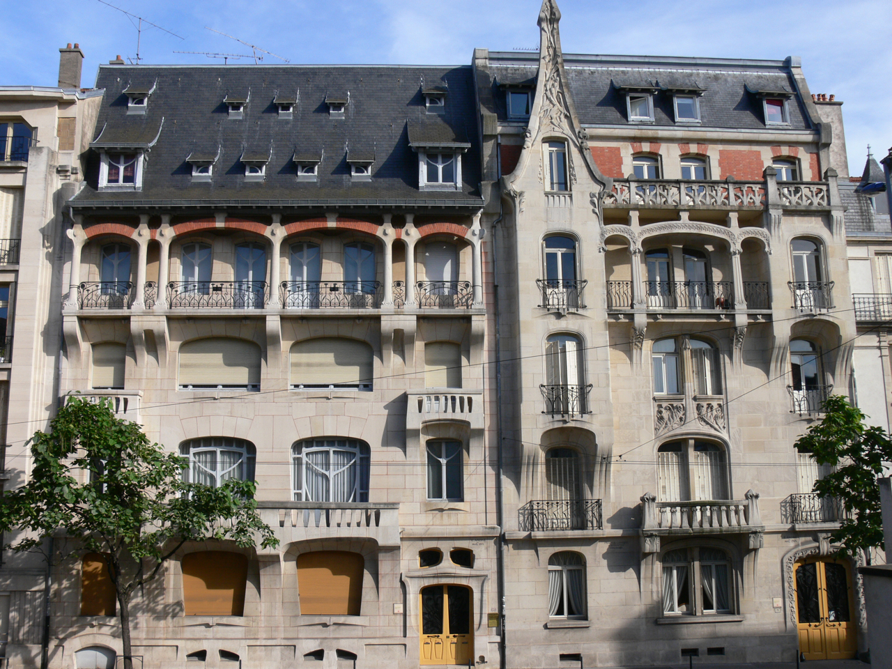 Immeubles jumeaux Lombard & France-Lanord, 69 & 71 avenue Foch, Nancy, Lorraine, France Construits entre 1902 & 1904 par Émile André